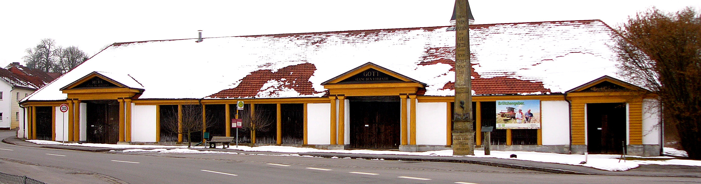 Ehemalige Schlossscheune. Klassizistischer langer Pfeilerbau mit Walmdach und drei giebelbesetzten Toren, bezeichnet 1816, im Kern barock. This is a photograph of an architectural monument.